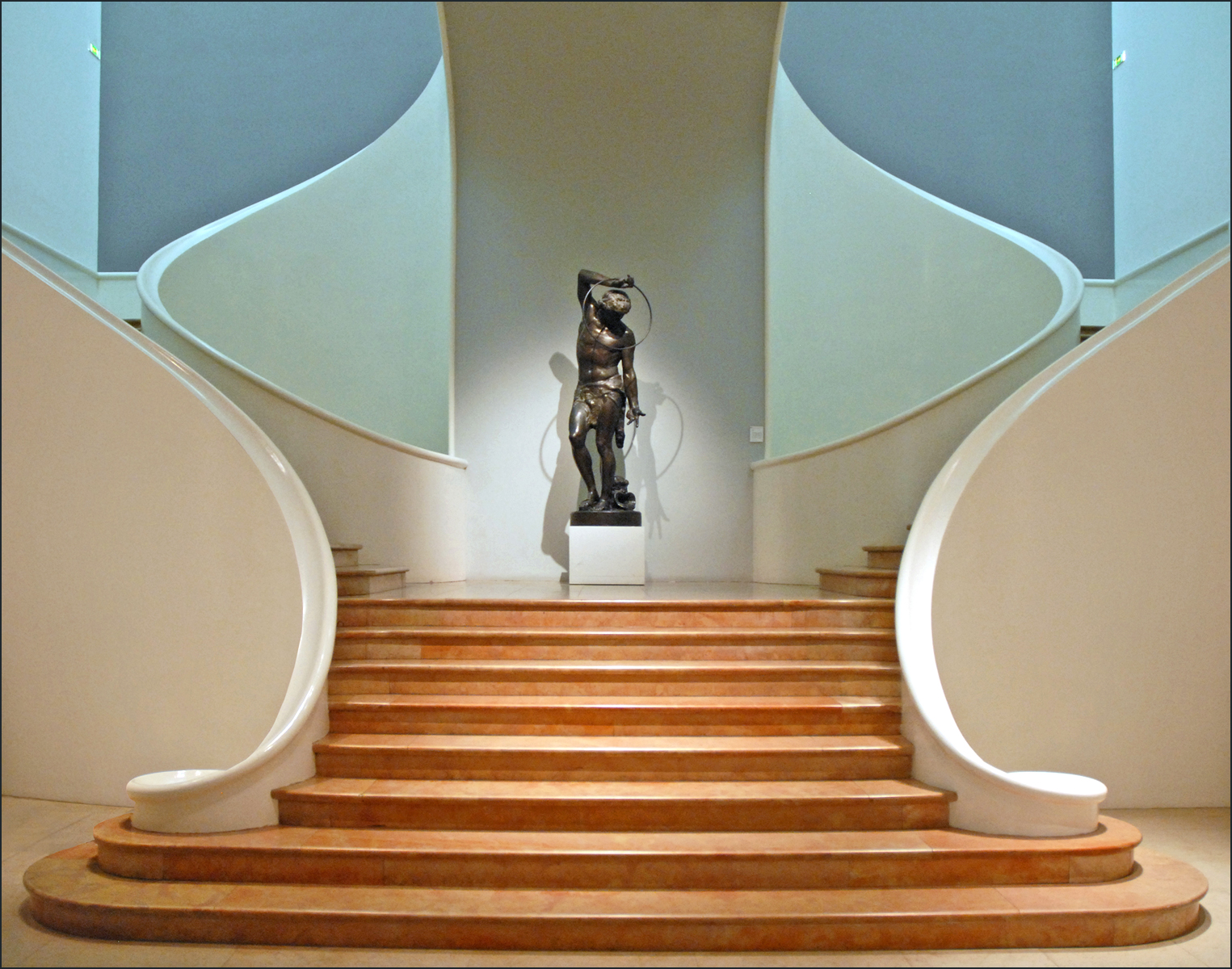 Grand escalier du musée des Beaux-Arts "Le musée des Beaux-Arts de Nancy créé en 1793 témoigne dans ses murs de l'architecture et de l'évolution urbaine de Nancy. Installé dans l'un des pavillons de la place Stanislas, il fut agrandi une première fois en 1936. Resté inachevé, le projet d'extension fut repris en 1995 par une équipe d'architectes nancéiens dirigée par Laurent Beaudouin. Résolument contemporaine, cette nouvelle extension a permis au musée de doubler sa surface et de s'équiper d'espaces plus fonctionnels" (extrait du site)